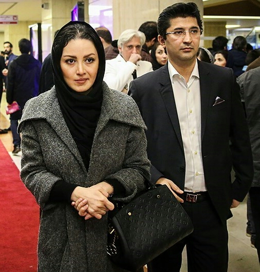 شیلا خداداد و همسرش - ۱۳۹۴